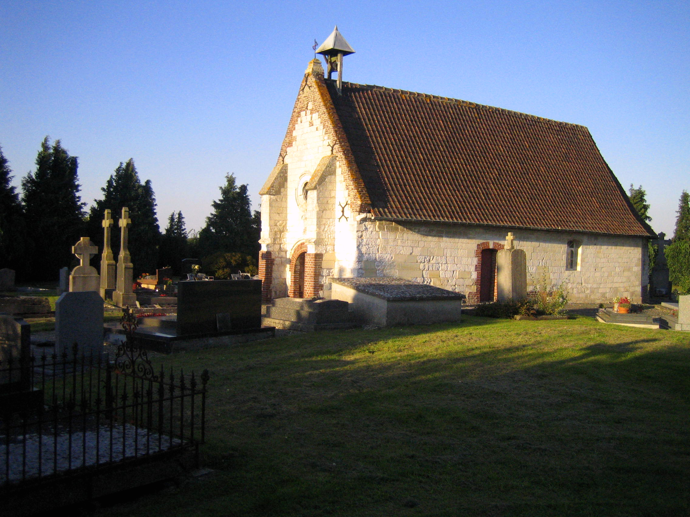 Bovelles (Somme, France) - La chapelle du cimetière (vue du Sud-Ouest). . .